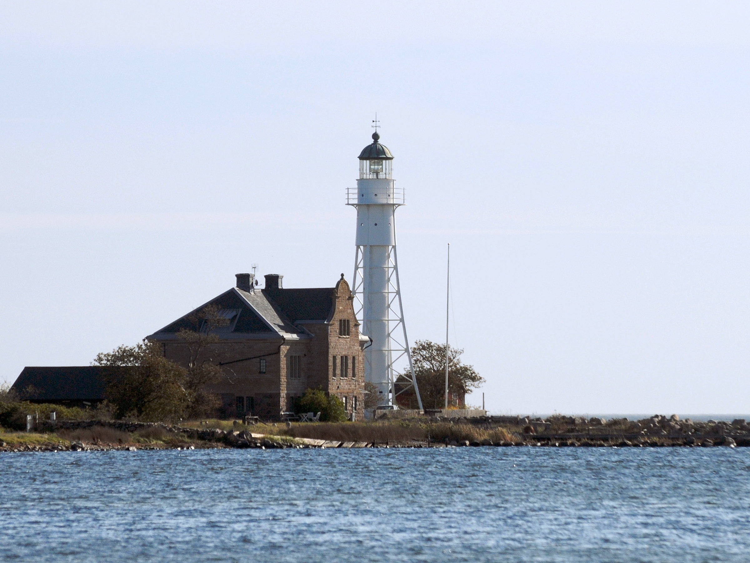 Högby fyr i Borgholms kommun, Öland